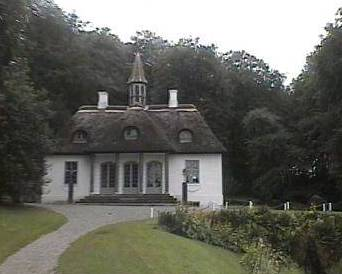 Slot Liselund